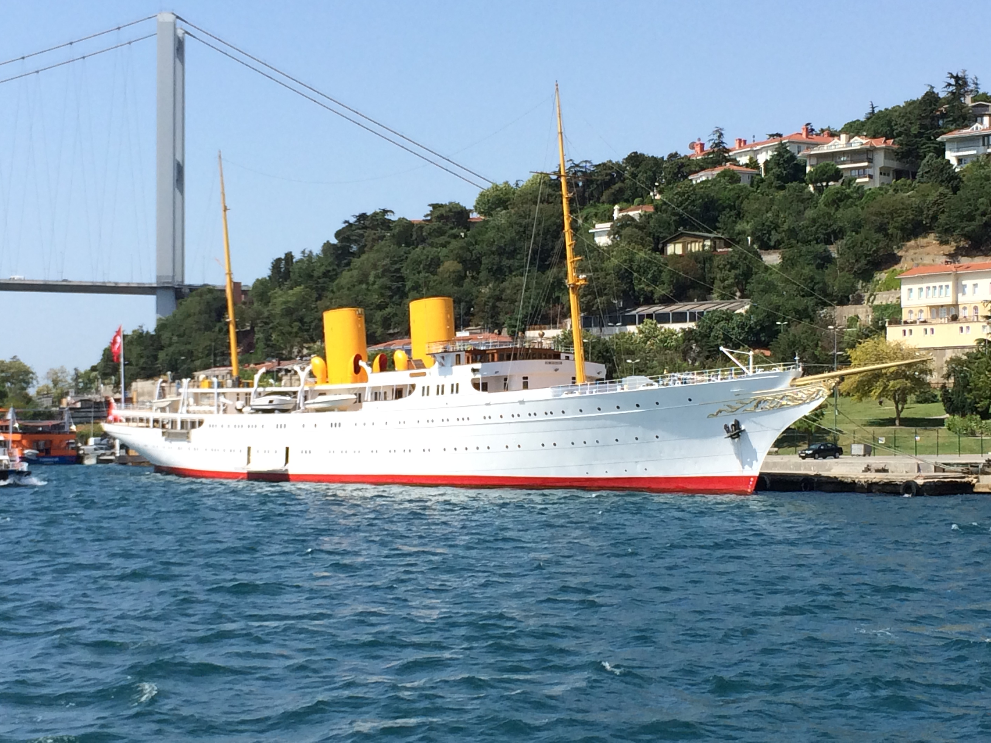 El Savarona, yate de Ataturk, primer presidente de Turquía